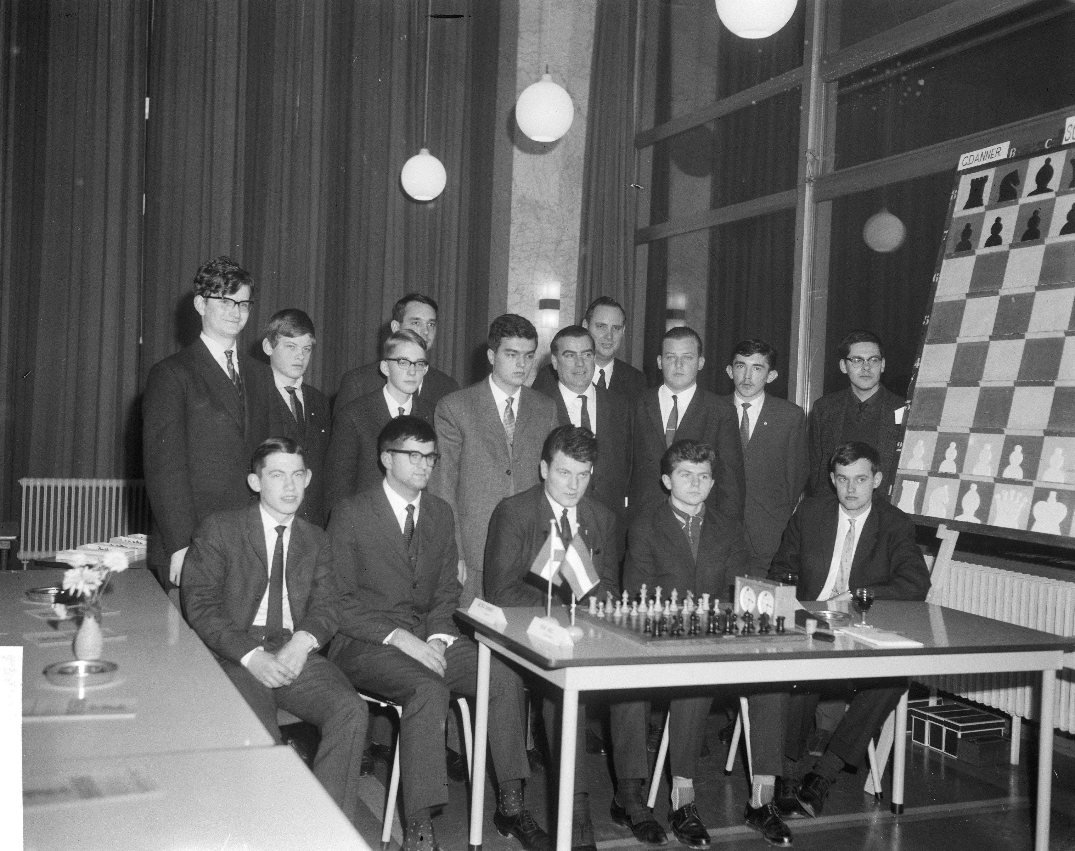 Collectie / Archief : Fotocollectie Anefo Reportage / Serie : [ onbekend ] Beschrijving : Internationaal Jeugd Schaaktoernooi te Groningen, de deelnemers: Andrew Whiteley (GB), Lennart Liljedahl (Zweden), André Lombard (Zwitserland), mr. XXX, Pedrag Ostojik (Z-Sl.), mr. YY, mr ZZ., Georg Pollak (Duitsland), Laszlo Vadasz (Hongarije), Hans Ree (NL). Voorste rij: Bent v. Pedersen (Denemarken), Czeslaw Jedrzejek (Polen), Georg Danner (Oostenrijk), Victor Kuprejtschik (Rusland), Henk Abels (NL). Datum : 27 december 1965 Locatie : Groningen Trefwoorden : groepsportretten, schaken, sport Fotograaf : Bilsen, Joop van / Anefo Auteursrechthebbende : Nationaal Archief Materiaalsoort : Negatief (zwart/wit) Nummer archiefinventaris : bekijk toegang 2.24.01.04 Bestanddeelnummer : 918-6100